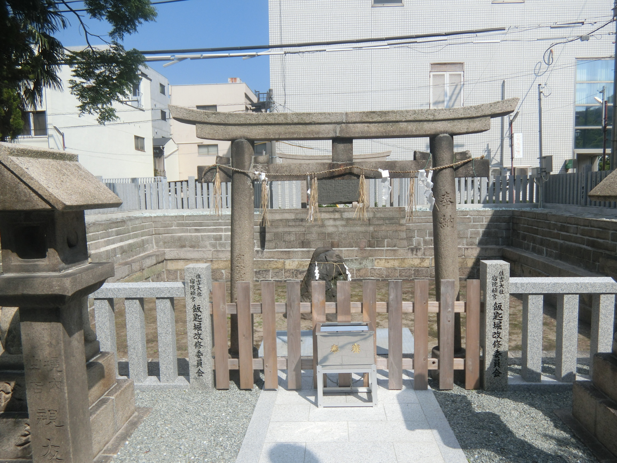 2016年に改修工事が行われた宿院頓宮飯匙堀